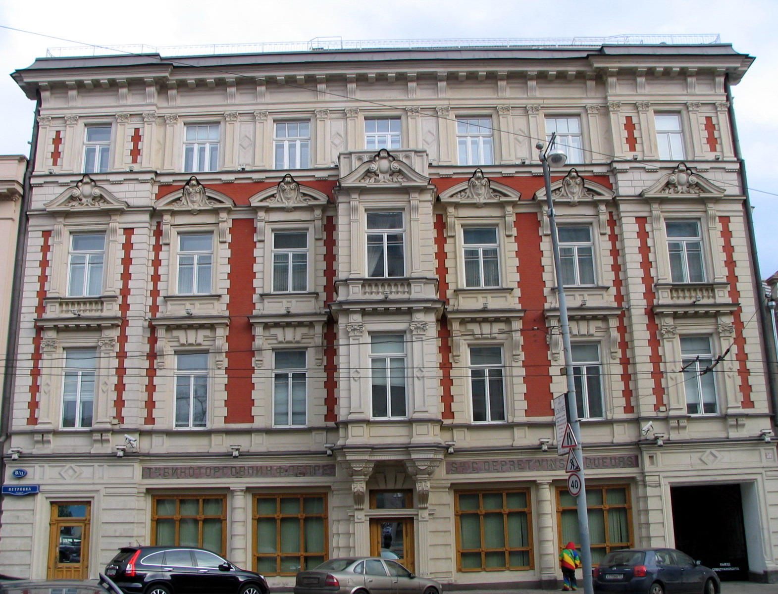 Petrovka Street, 8. Moscow. Depret House